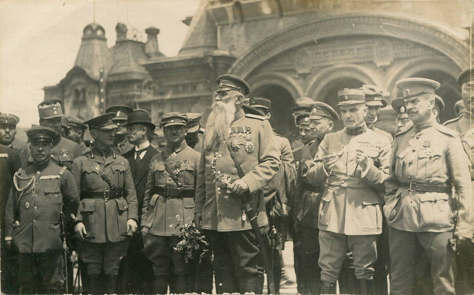 Представители союзных армий во Владивостоке. В центре генерал-лейтенант Дмитрий Леонидович Хорват (1858 — 1937). Слева от него представитель чехословацких войск генерал-майор Станислав Чечек (1886 — 1930).